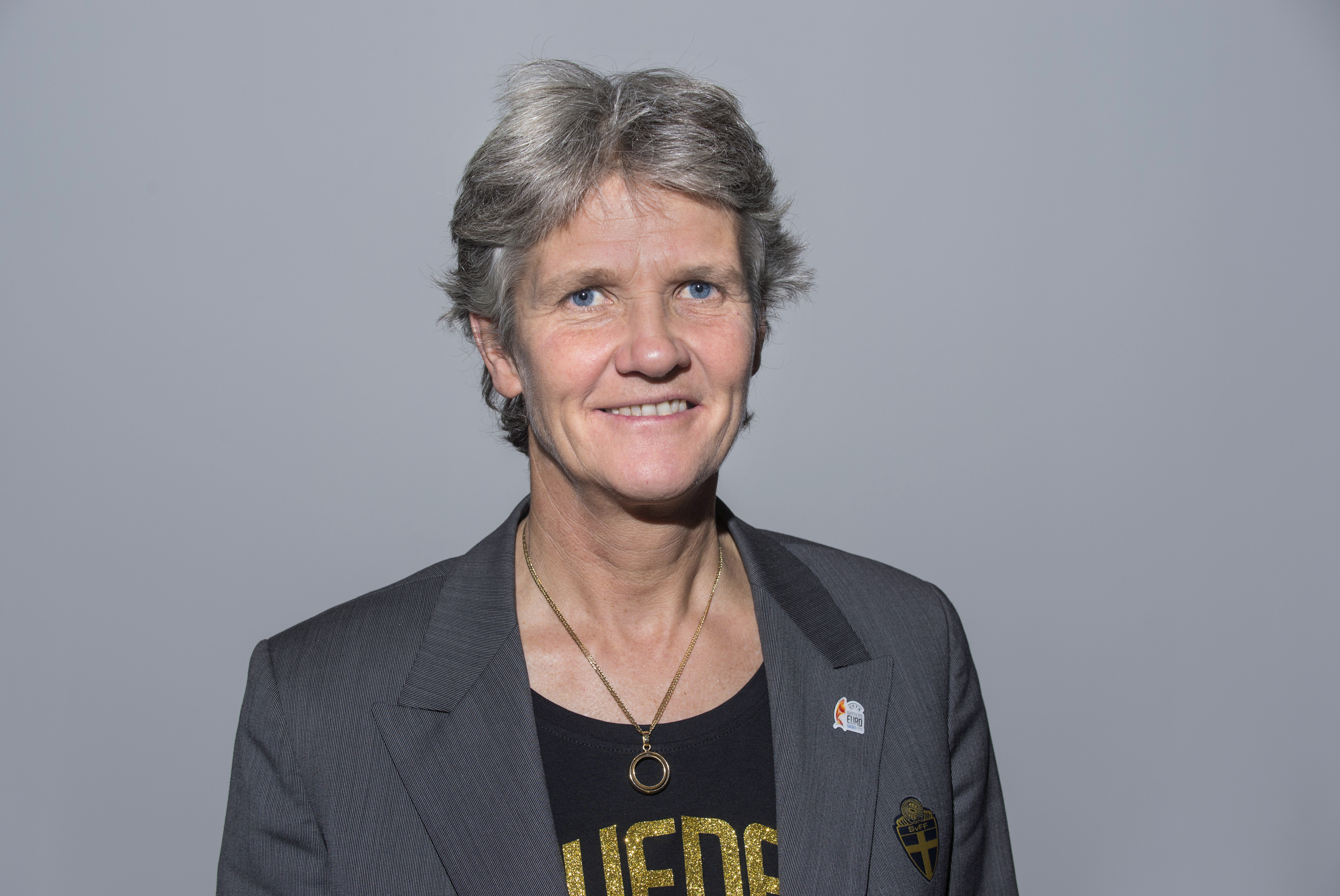 Pia Sundhage, förbundskapten damlandslaget.